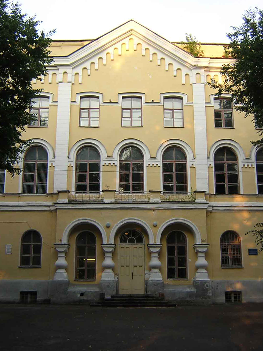 Учебный корпус НовГУ. Здание бывшей Духовной семинарии в Антониевом монастыре. Великий Новгород